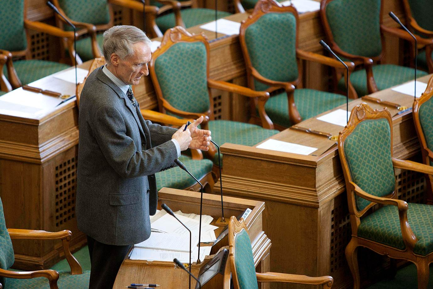 Bertel Haarder i forbindelse med grænsehindringsdebat i Folketinget.